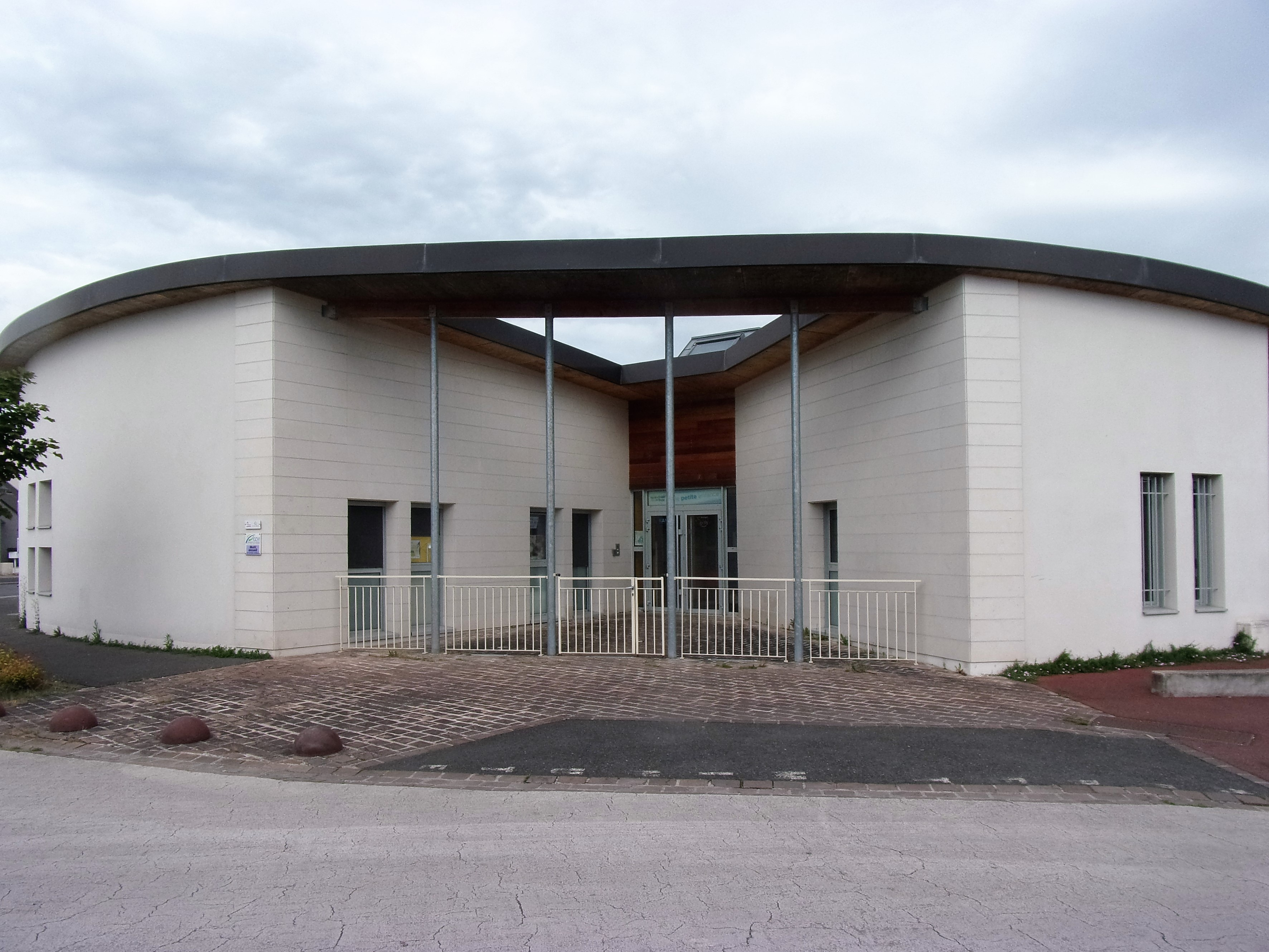 Bâtiment du pôle "petite enfance" de Monts.